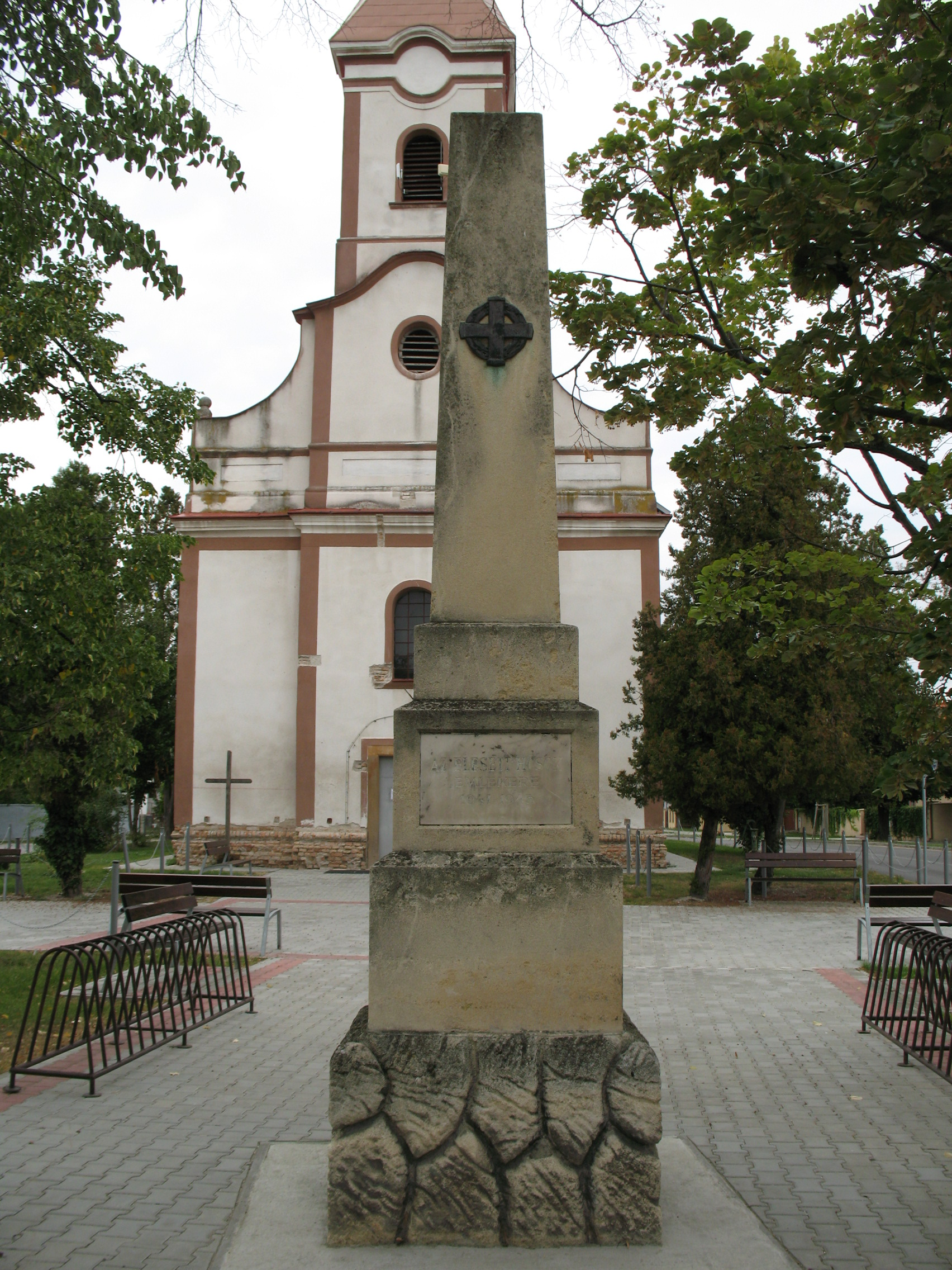 Lég falu